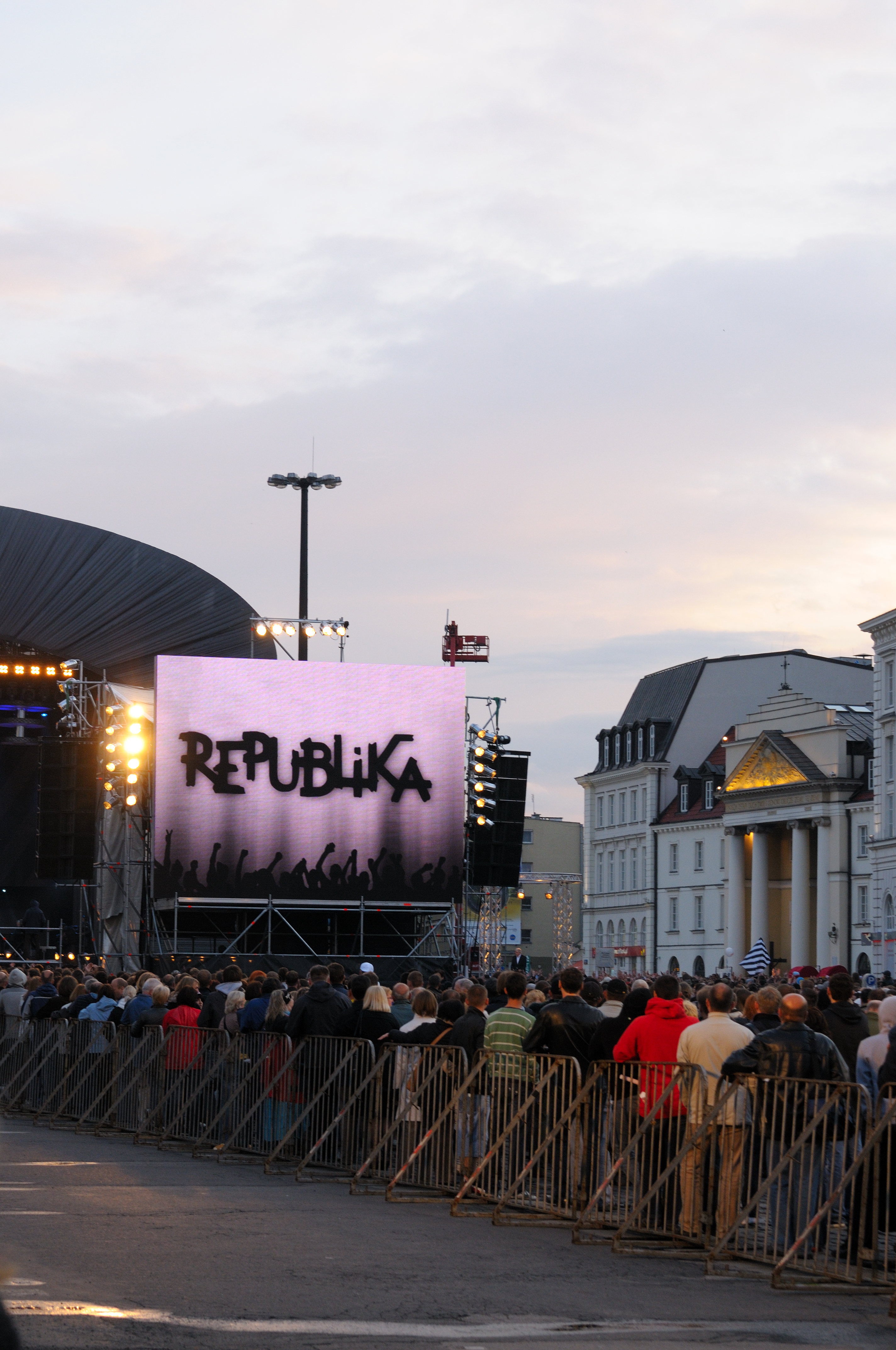 Koncert "4. czerwca"